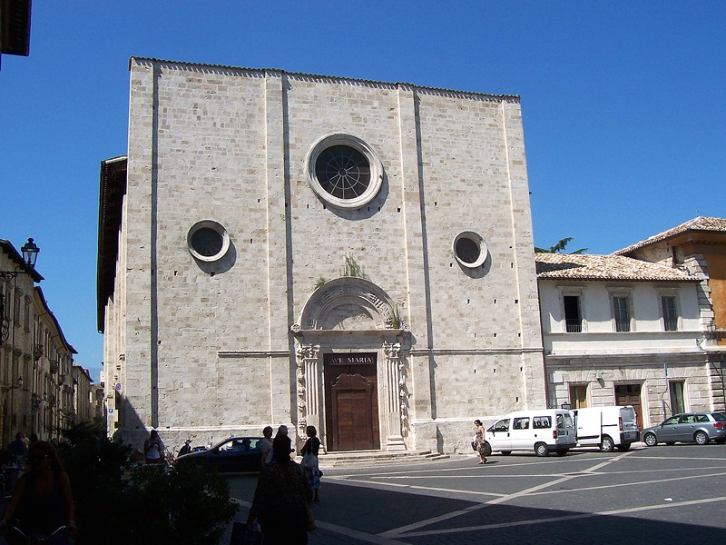 Ascoli Piceno - Chiesa di S. Agostino